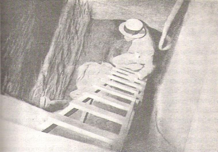 Túnel del penal de Punta Carretas, por donde se produjo la fuga de los anarquistas detenidos.